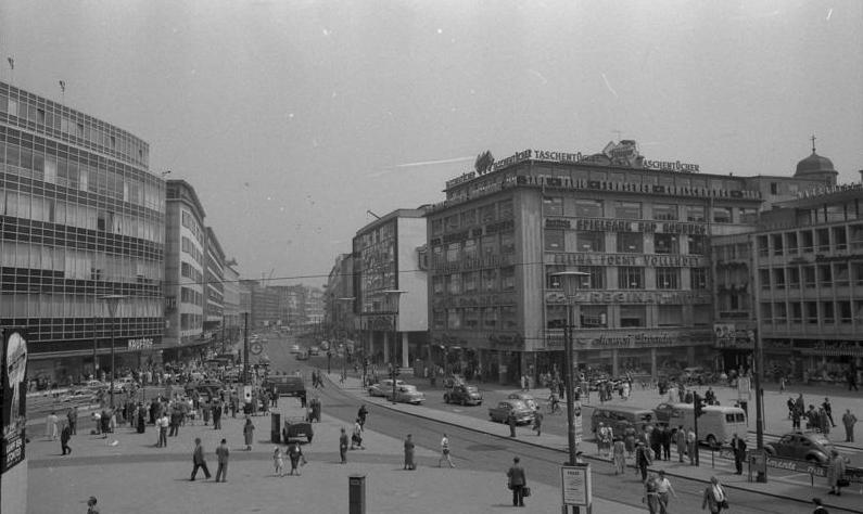 Stadtaufnahmen in Frankfurt/Main Blick auf "die Zeil"